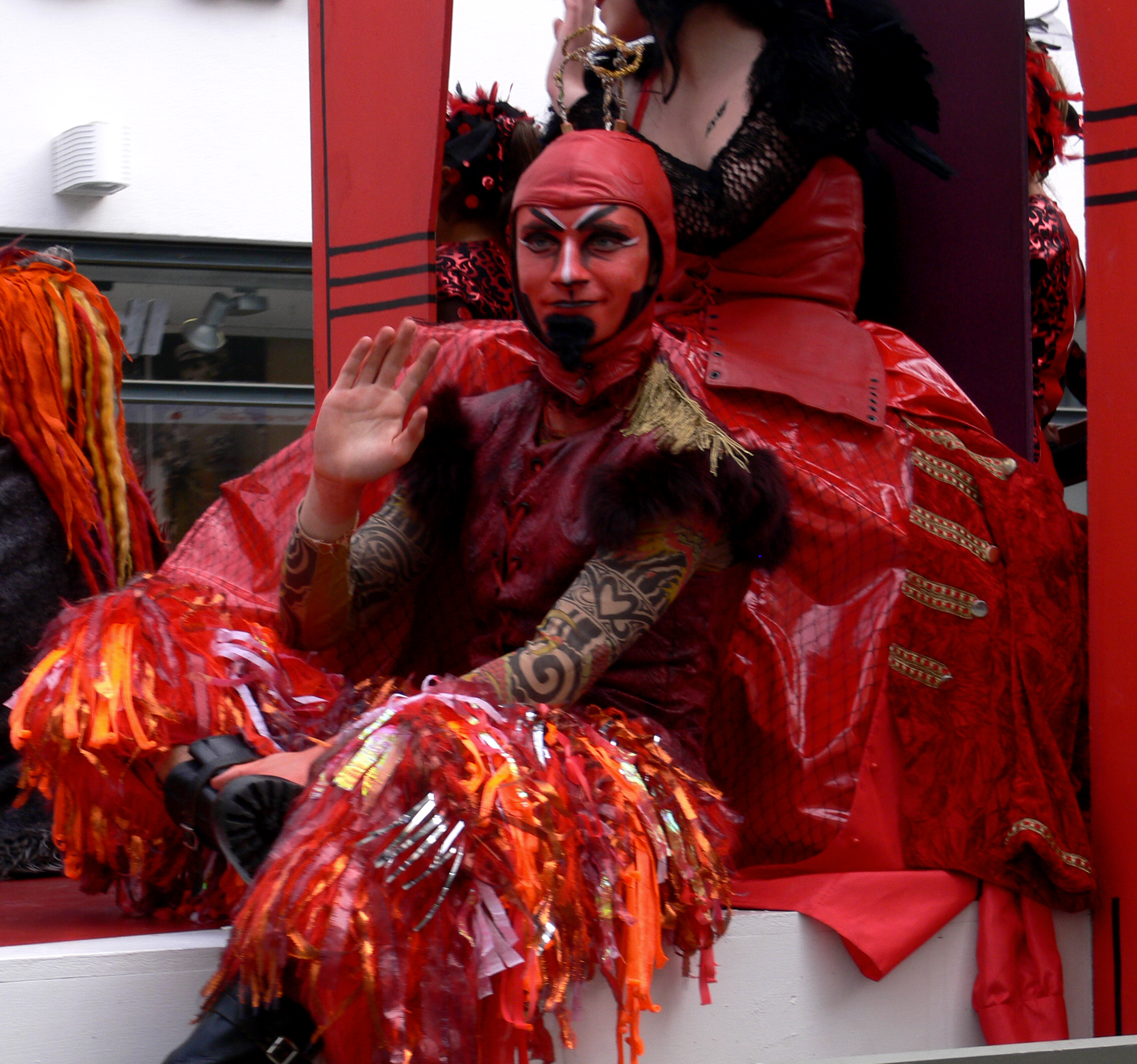 Rutenfest 2010, Festzug am Rutenmontag, Titelfigur des Rutentheaters 2010 „Der Teufel mit den drei goldenen Haaren“